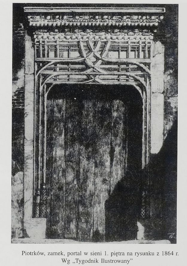 Portal z XVI wieku w wieży królewskiej w Piotrkowie Trybunalskim. Ilustracja z Tygodnika Ilustrowanego z 1864 roku.